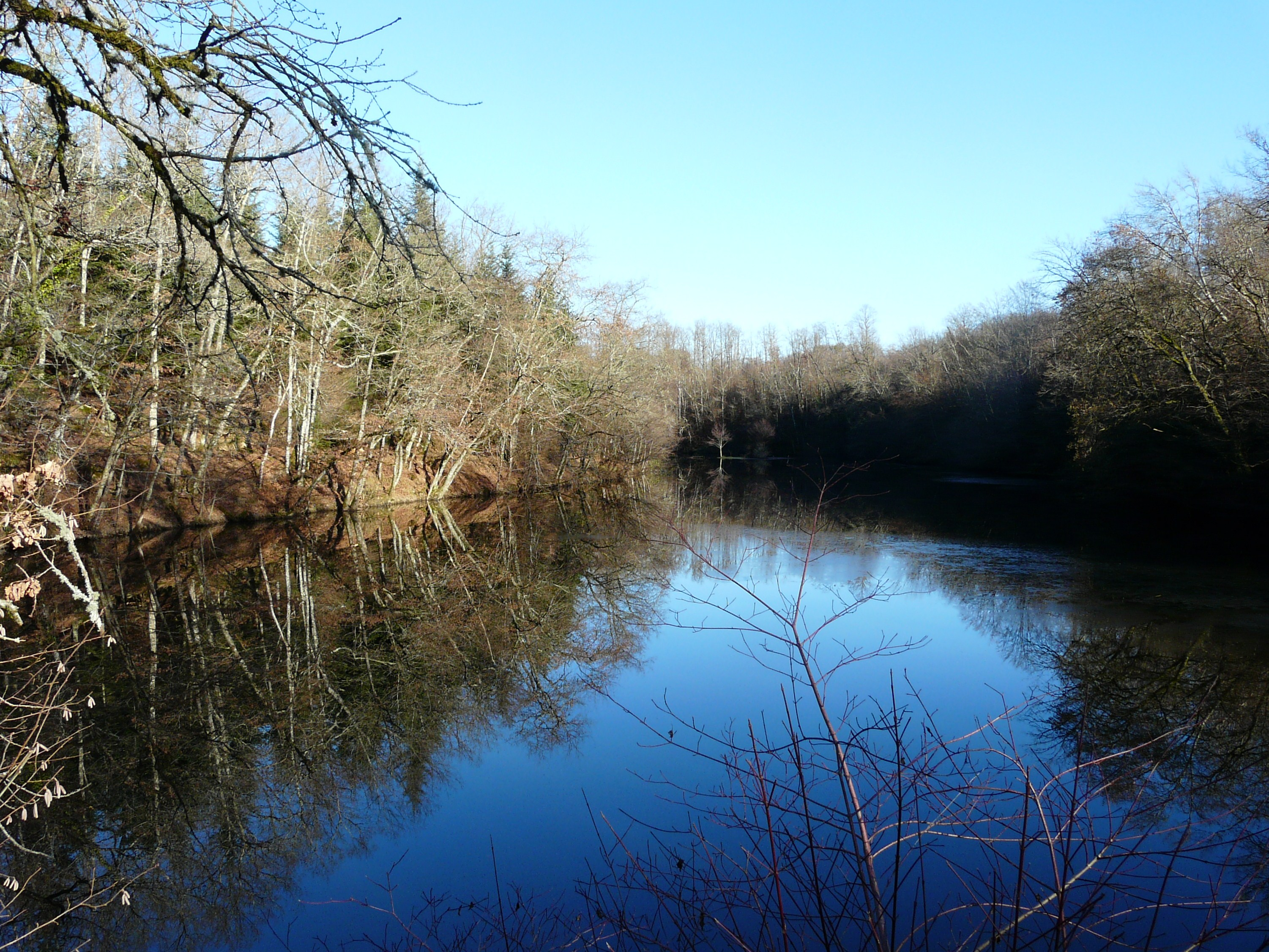 L'étang alimenté par la Valouse en amont de la forge de Mavaleix, entre Chalais (à gauche) et Saint-Paul-la-Roche (à droite), Dordogne, France.